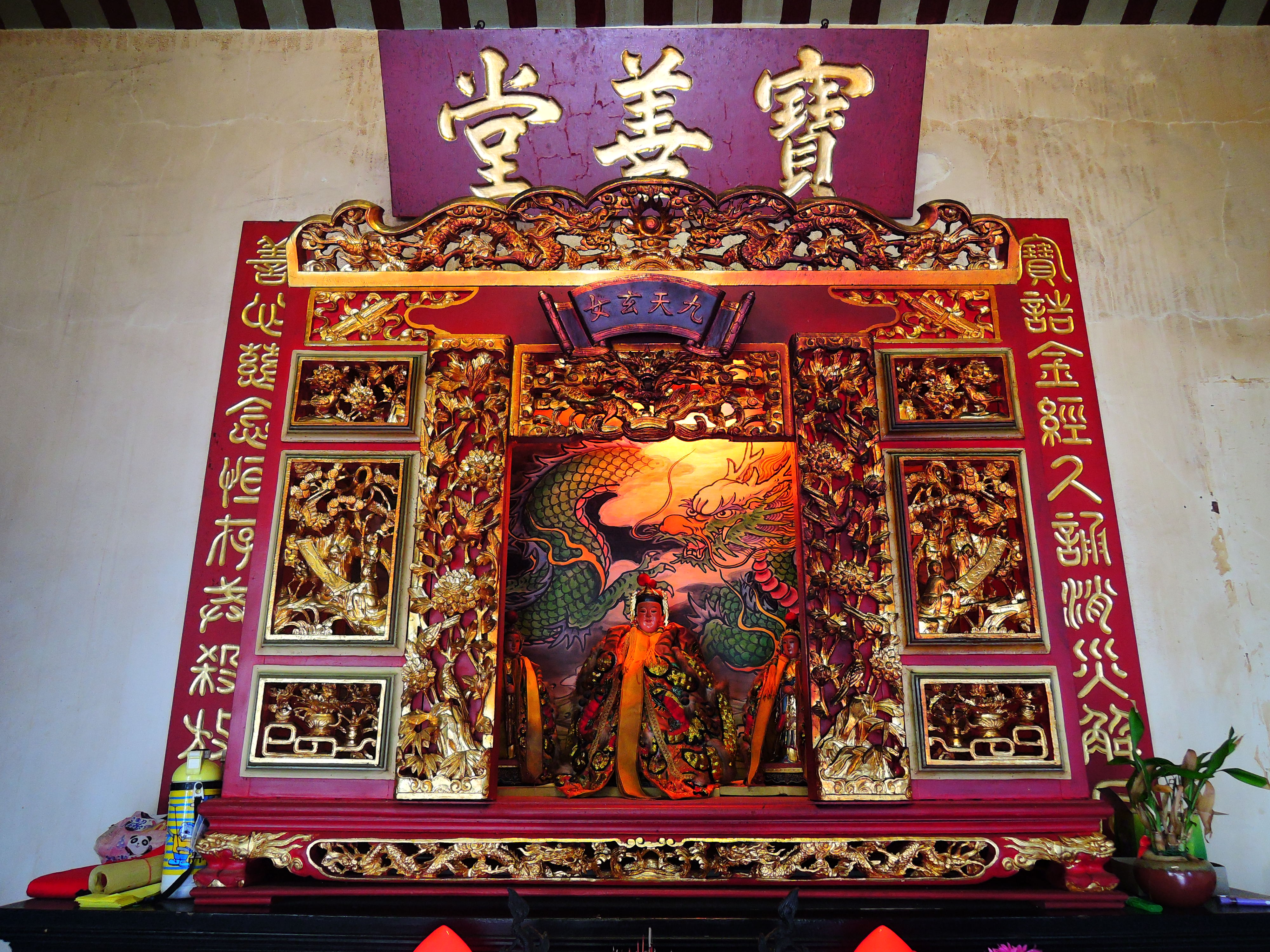 中文（台灣）: 東護龍（寶善堂） 九天玄女